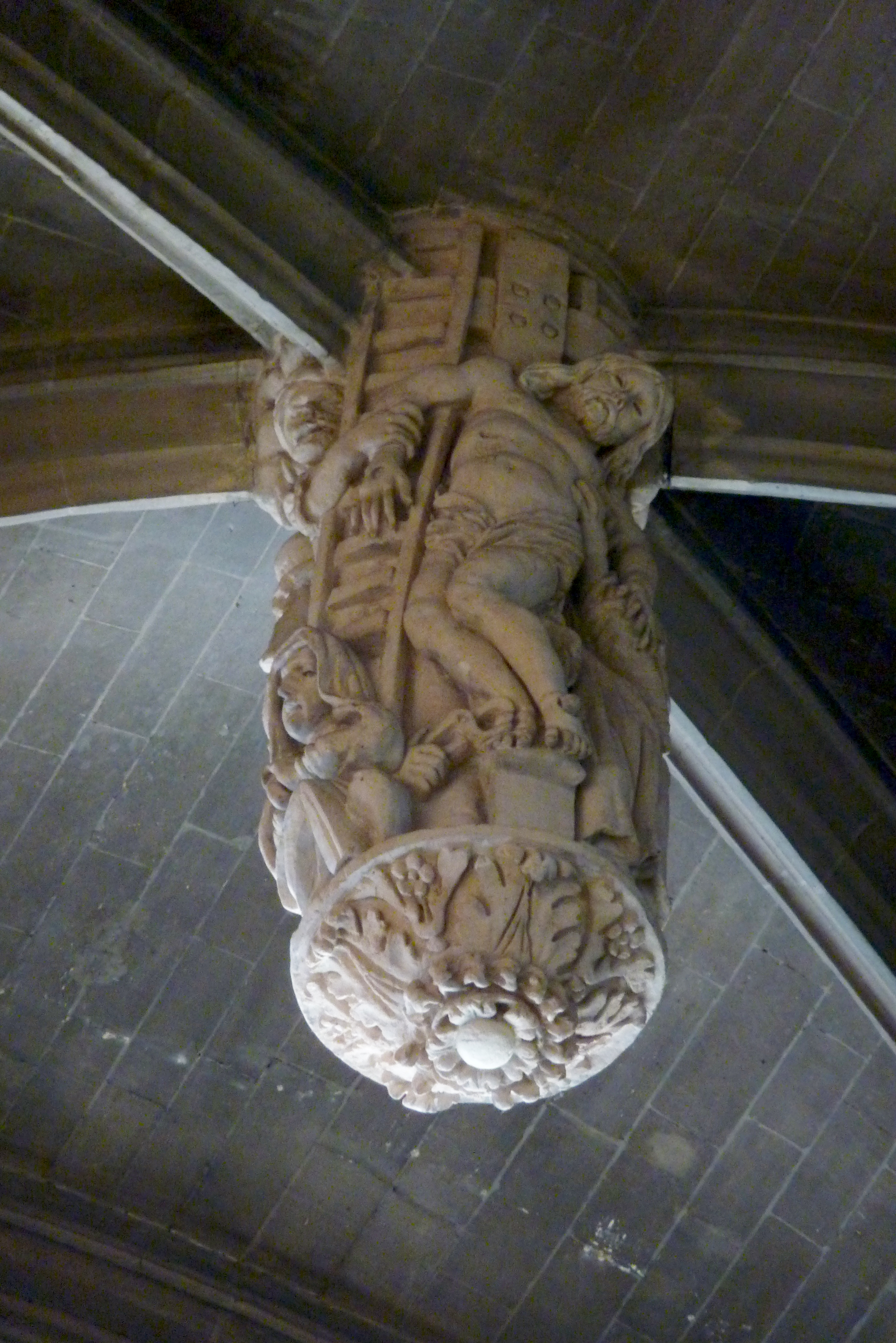 Katholische Pfarrkirche Saint-Laurent im 10. Arrondissement von Paris, Schlussstein, Darstellung: Kreuzabnahme Jesu